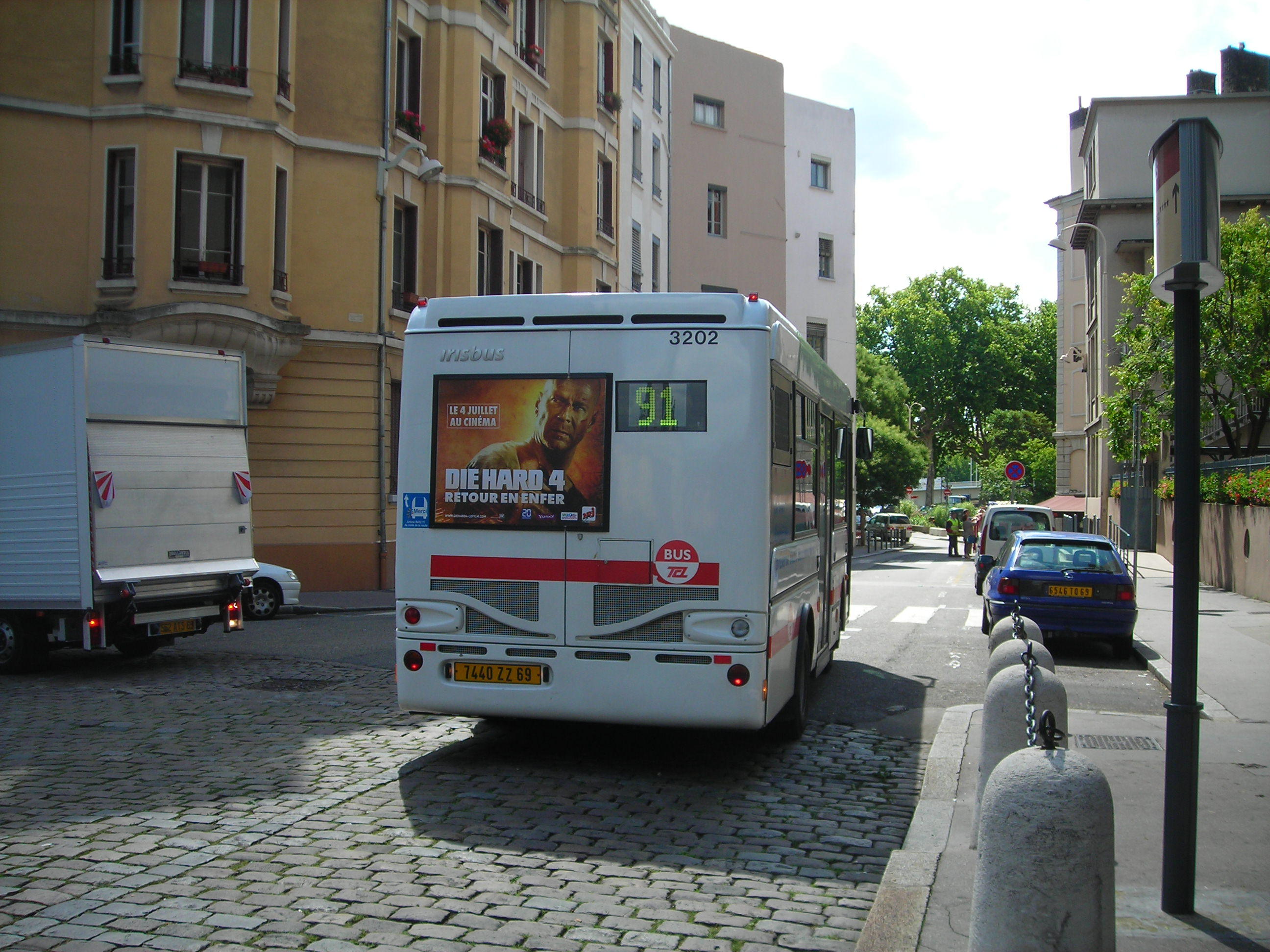 Midibus électrique Irisbus Europolis des TCL de Lyon vu de derrière partant du terminus Saint-Paul Gare de la ligne 91 (Navette Presqu'île).